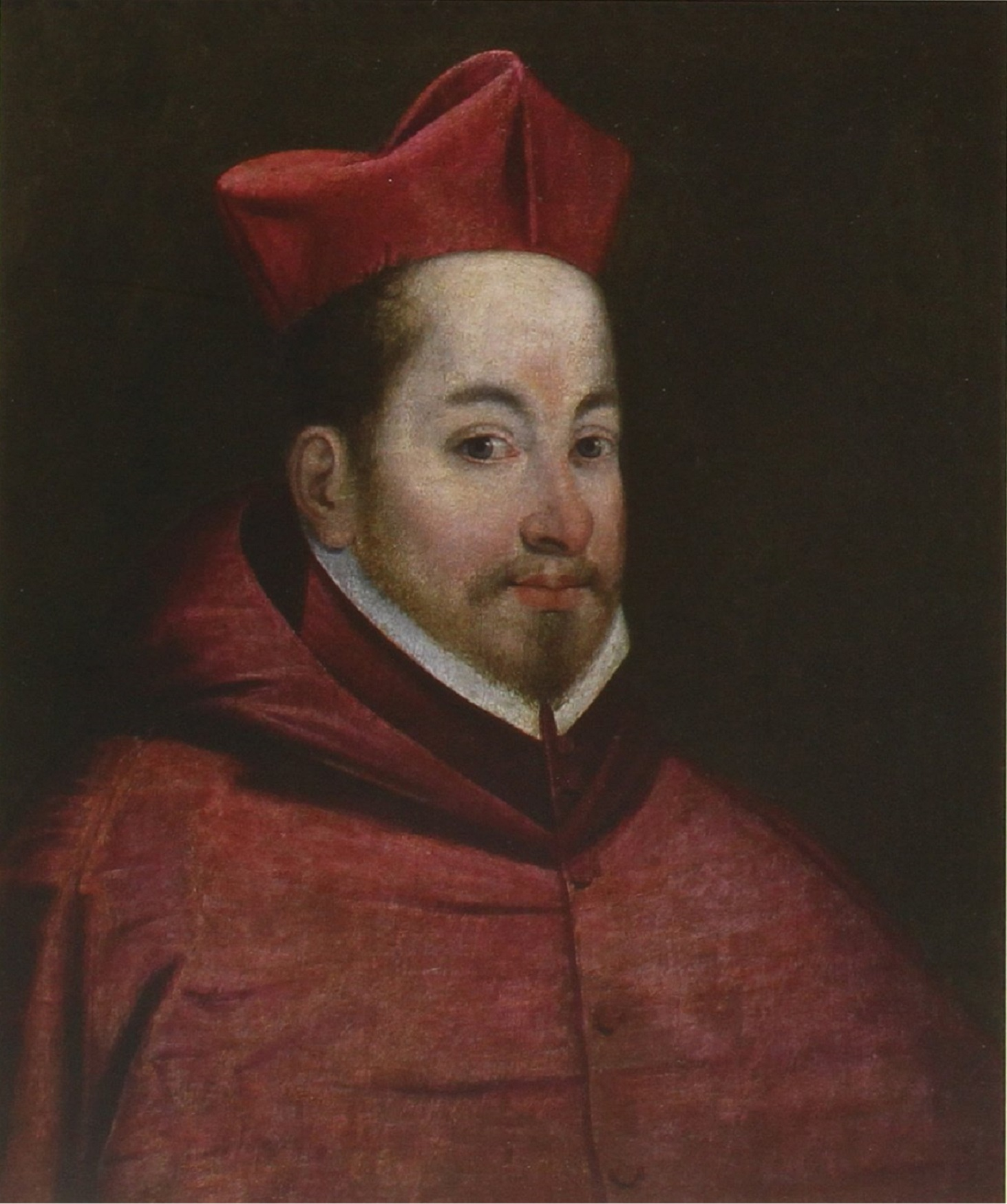 Ascanio Colonna cardinale